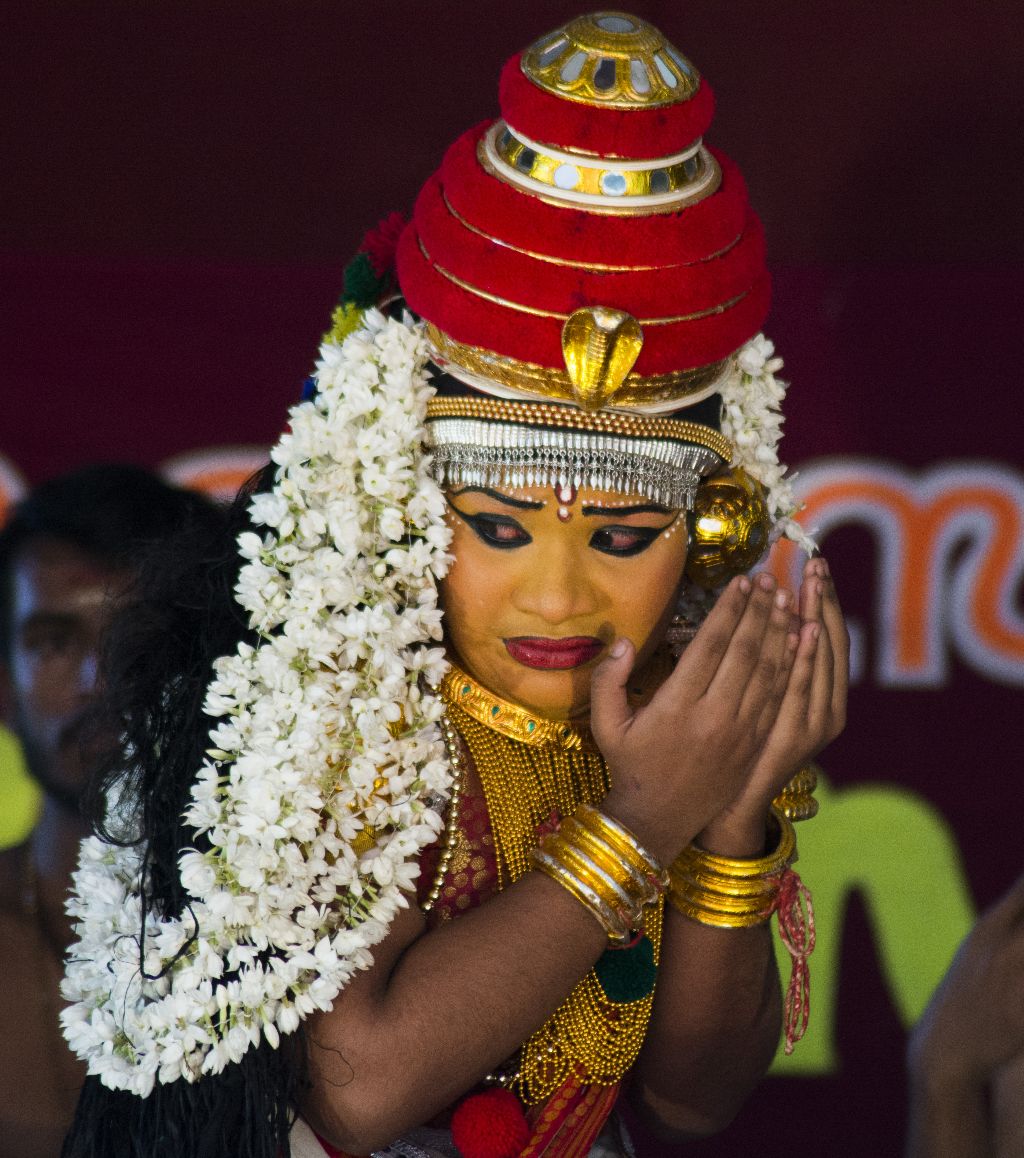 kerala school kalolsavam